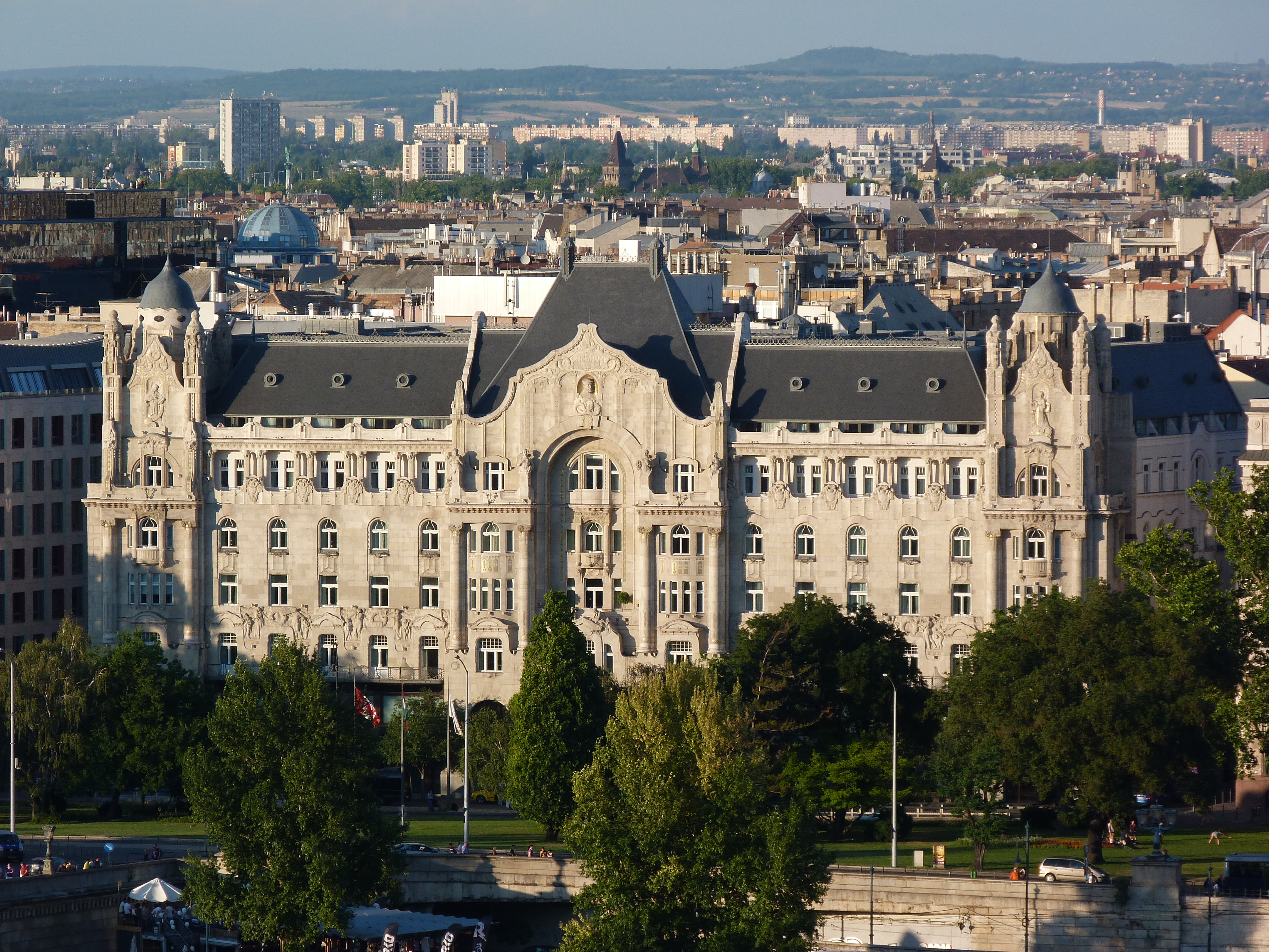 A felvétel 2014.07.15-én készült Budapesten, a Budai Várból. ©© Derzsi Elekes Andor, Budapest, 2014, You are authorised to use these photos and vids under Creative Commons – even for commercial, for profit purposes. Photos must be attributed to Derzsi Elekes Andor. All of the photos and vids in the Metapolisz DVD line are under Creative Commons and can be used even for commercial – for profit – purposes. Recommended Citation Derzsi Elekes Andor: Metapolisz DVD line